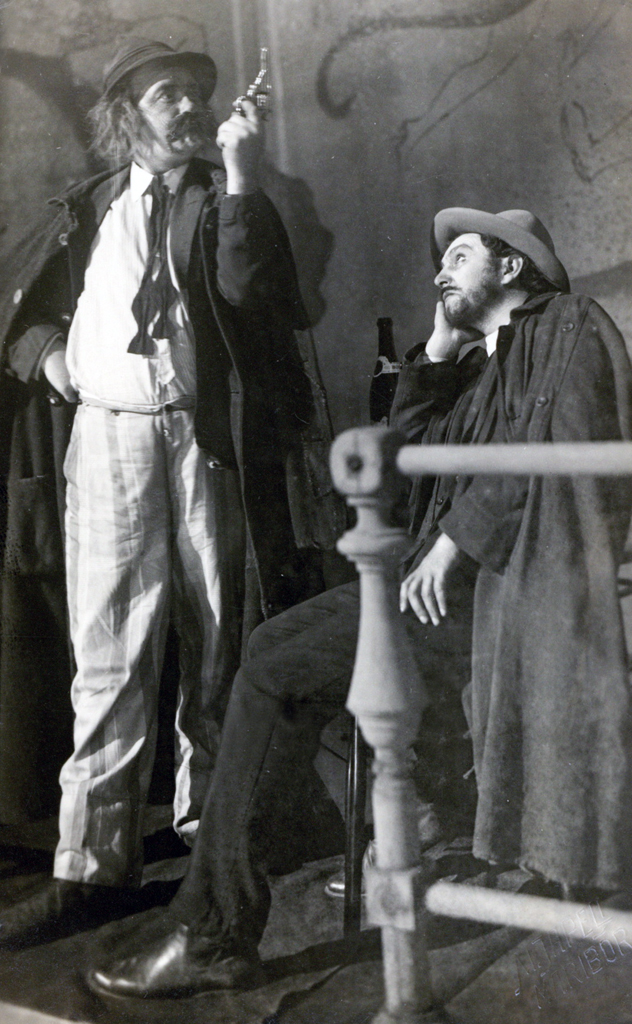 Lev Nikolajevič Tolstoj, Živi mrtvec, Narodno gledališče v Mariboru. Na fotografiji: Pavle Kovič (Preiskovalni sodnik), Rado Nakrst (Fjodor Vasiljevič Protasov - Fedja).